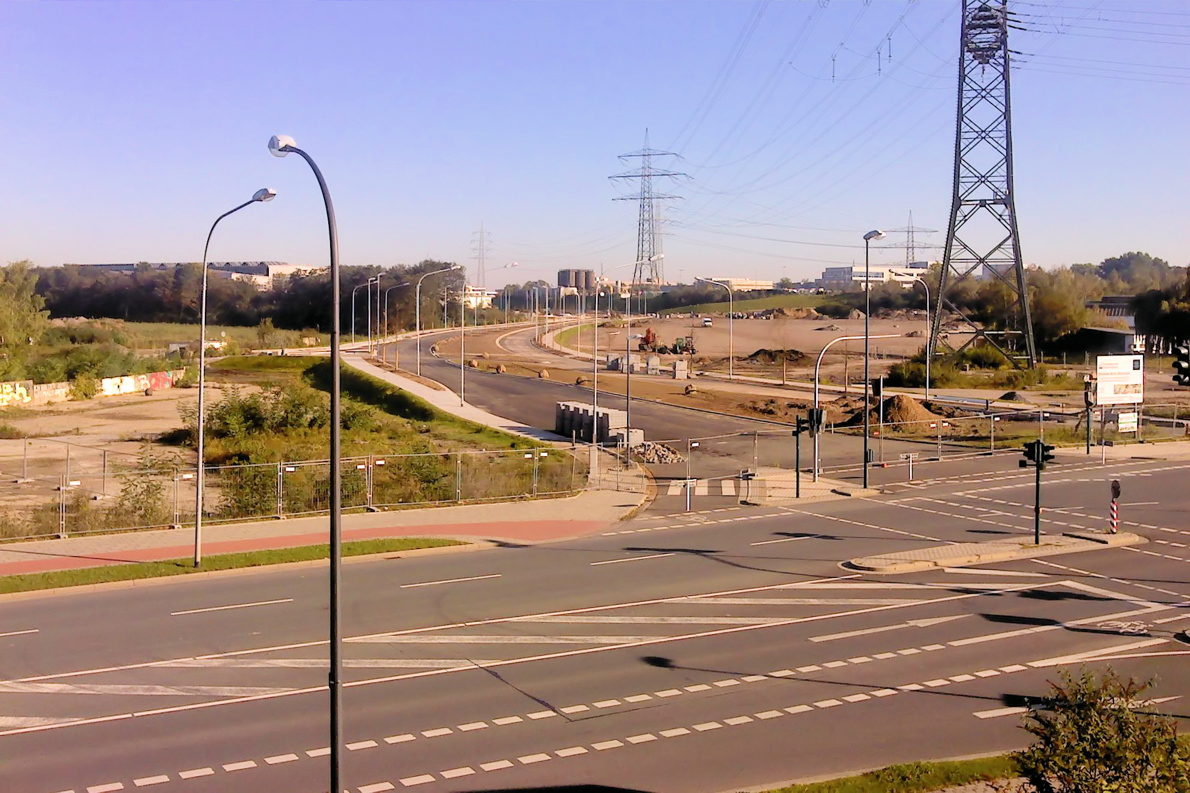 Berthold-Beitz-Boulevard in Essen, 2. Bauabschnitt